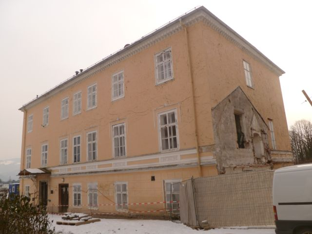 ehem. Daun- oder Domherrenschlösschen, Villa Bertha